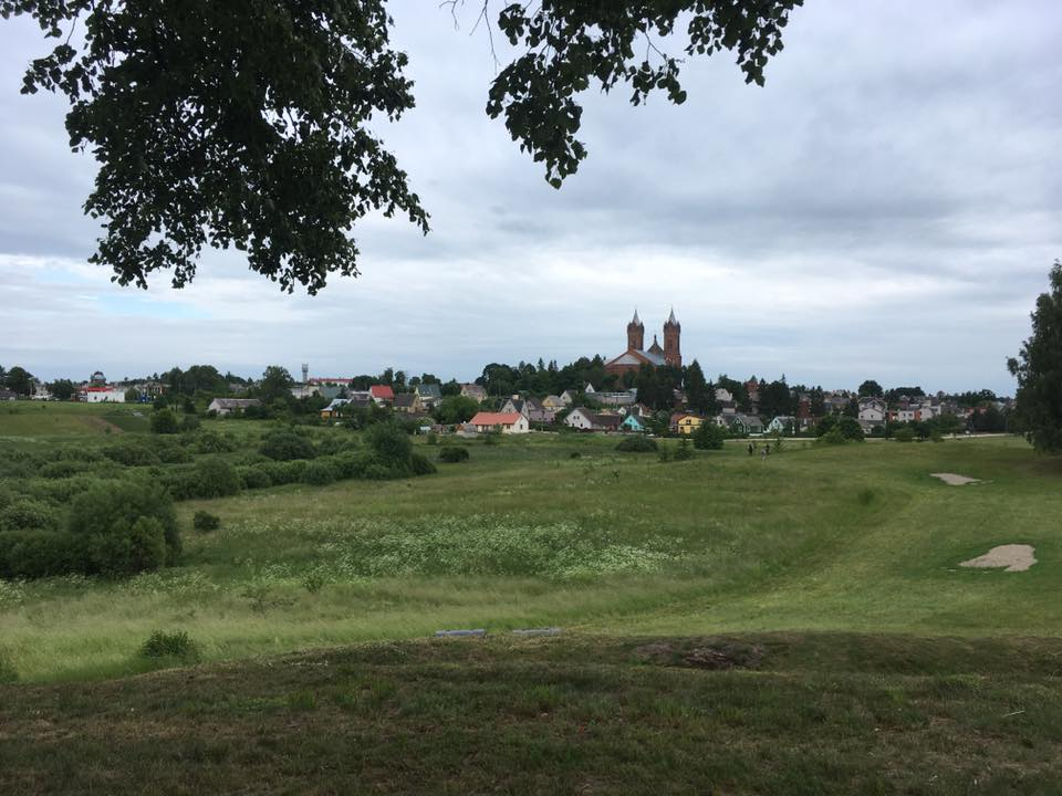 Vaizdas nuo piliakalnio